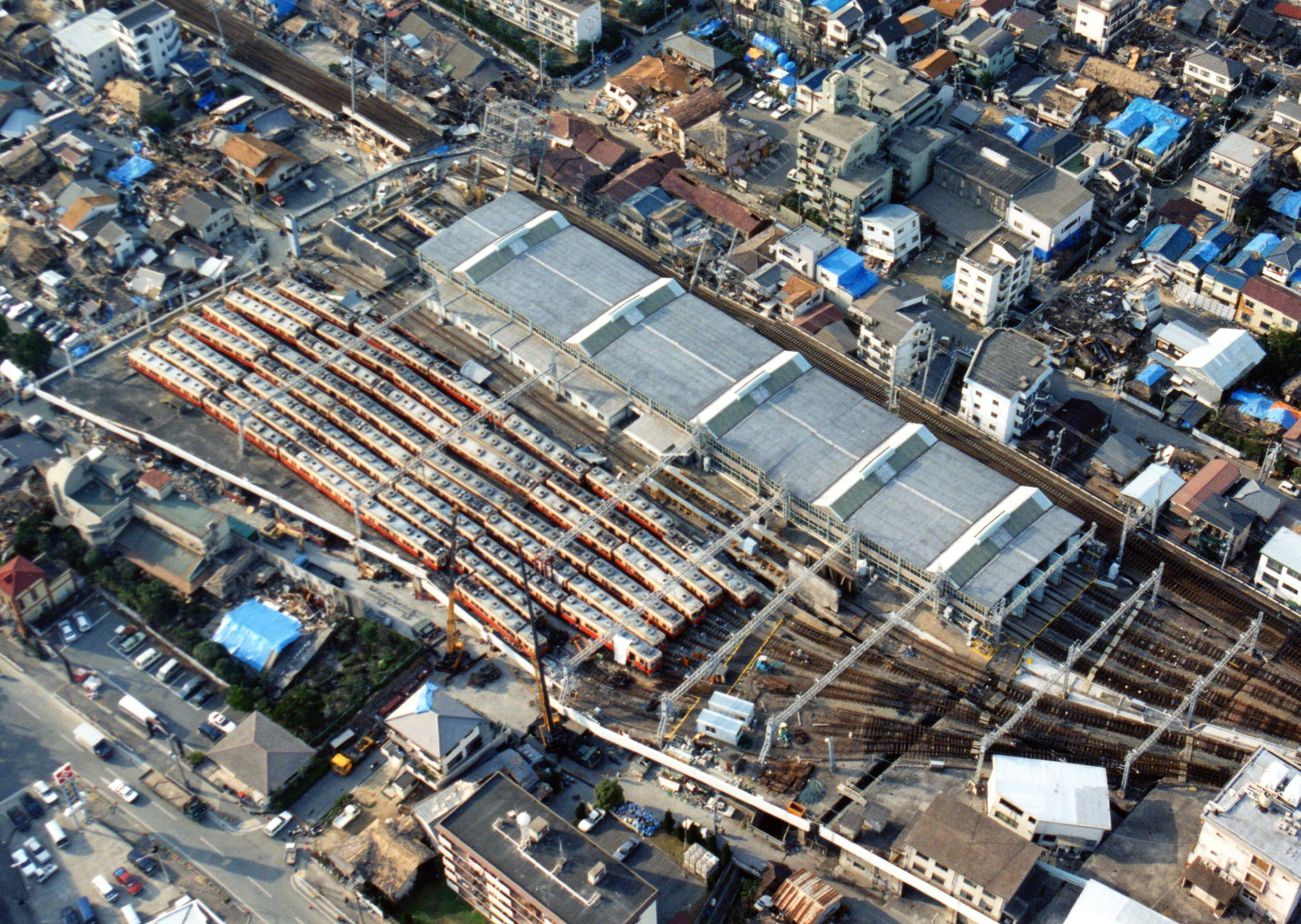 東灘区御影塚町阪神電鉄石屋川車庫（1995年1月27日）